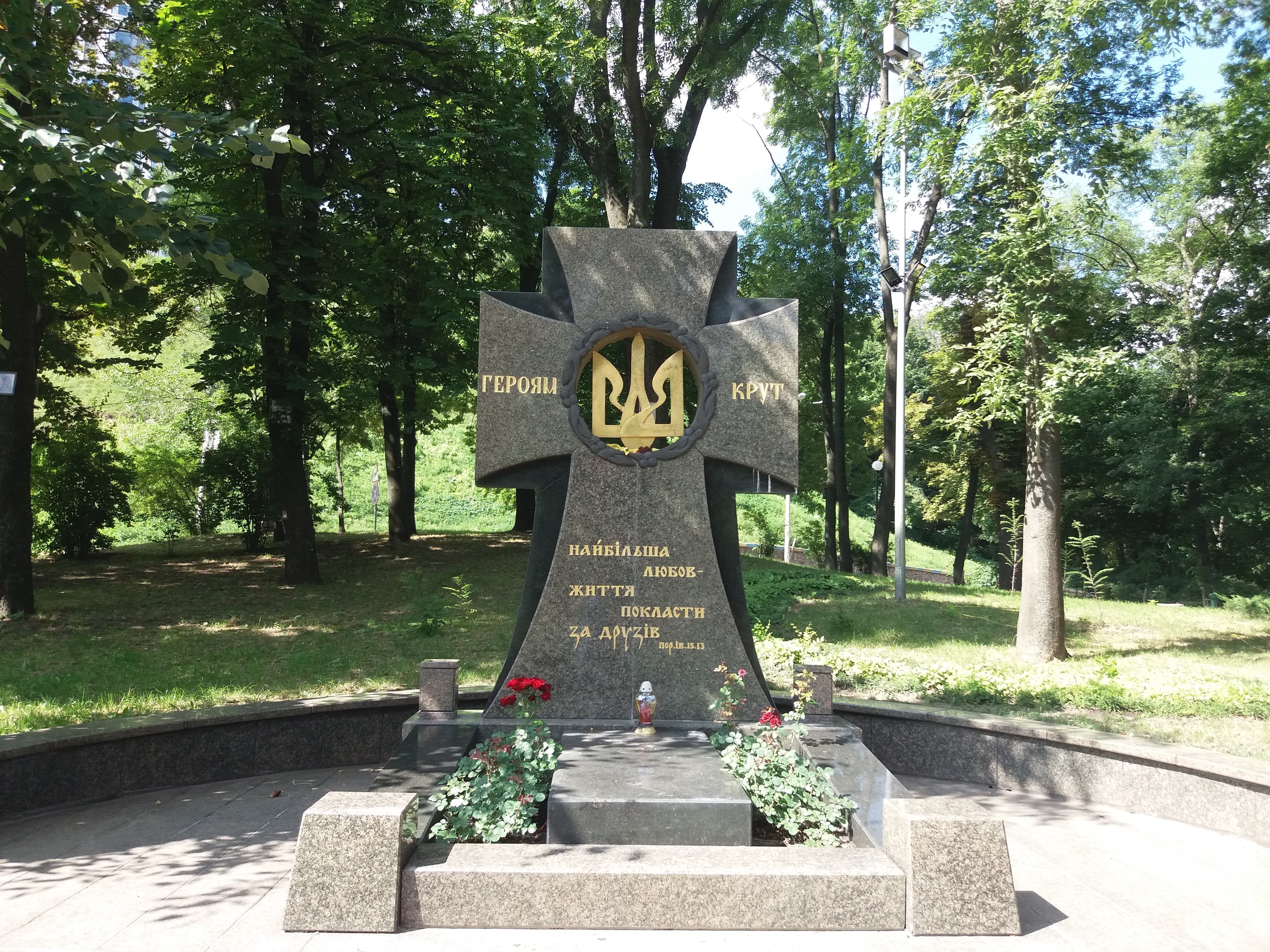 Пам'ятне місце перепоховання вояків студентського куреня, загиблих під ст. Крути, Київ, Паркова дорога